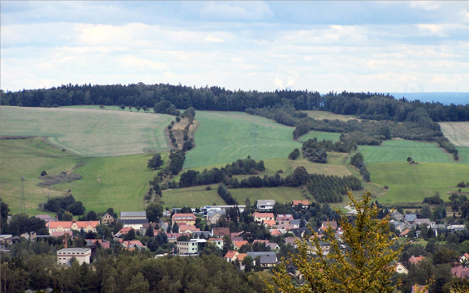 Neukirch(Lausitz)vom Valtenberg aus gesehen